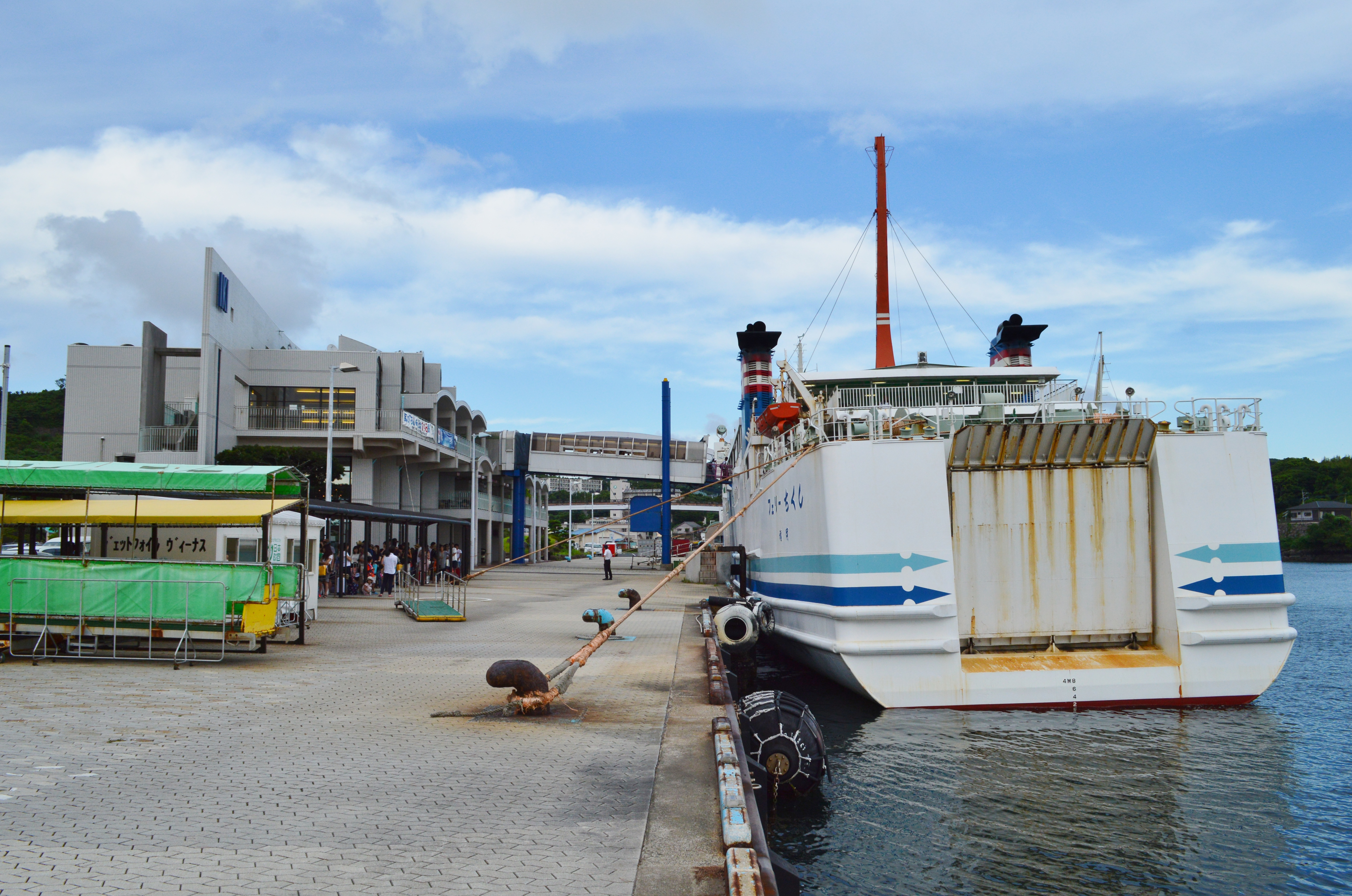 郷ノ浦港に係留中のフェリーちくし